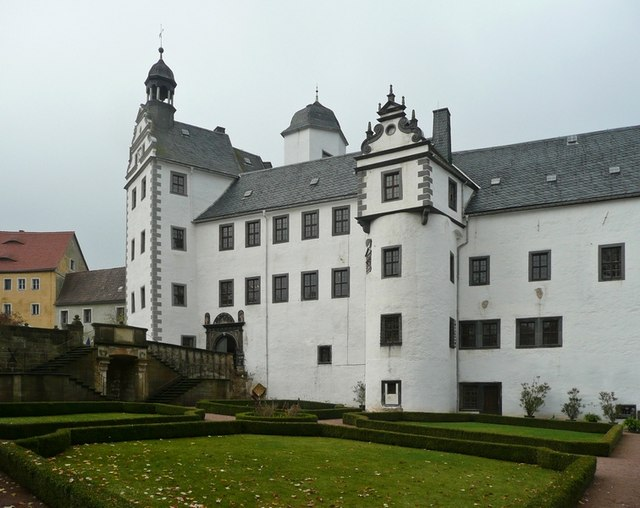 Schloss Lauenstein im Osterzgebirge (Lauenstein castle)